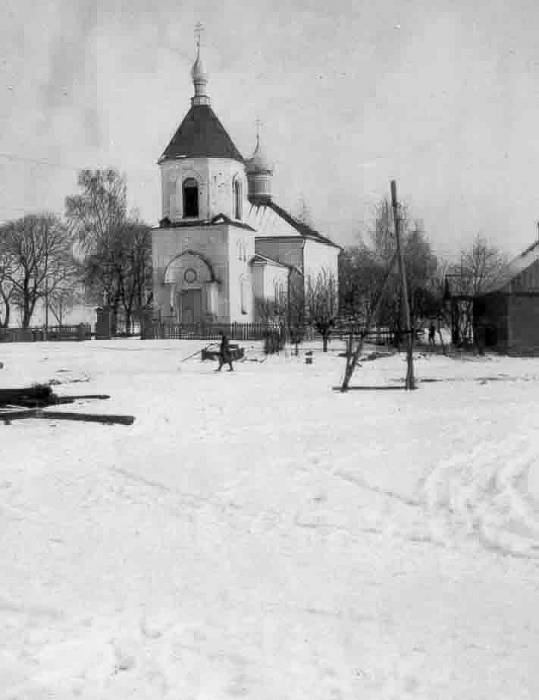 Нароча. Царква прарока Іллі. Фота невядомага нямецкага салдата ў час 1-ай Сусветнай вайны.